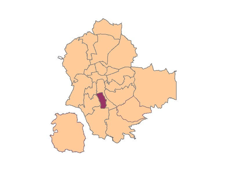 plans de saint-etienne Quartier de Bizillon Centre Deux